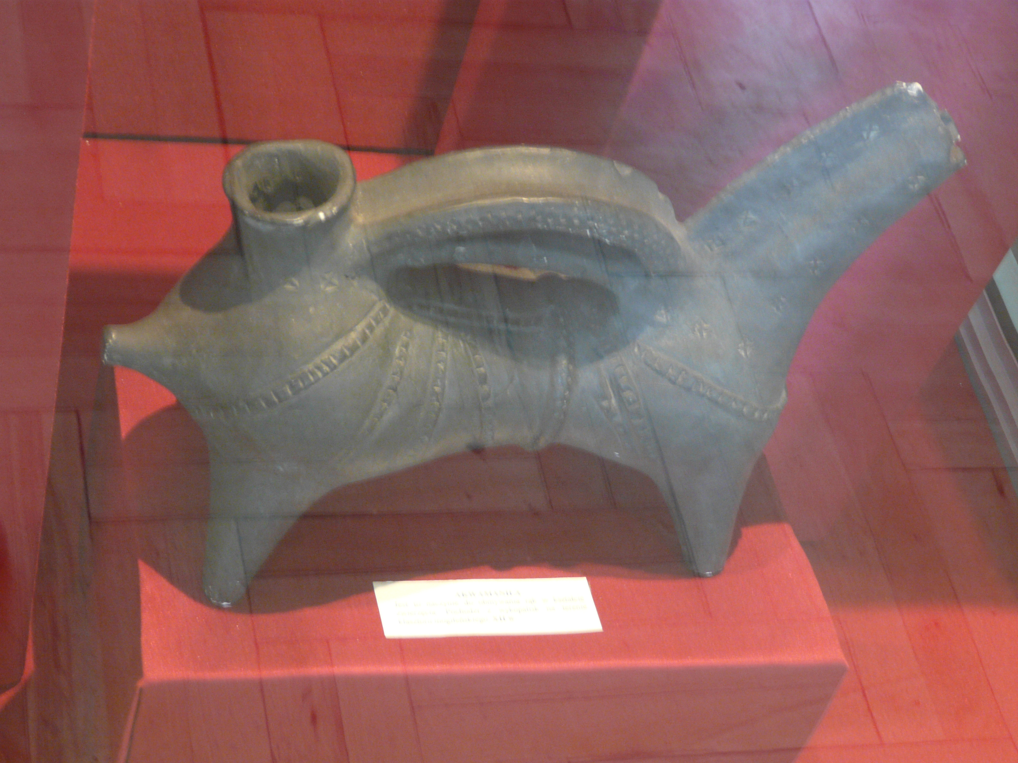 Museum of Archdiocese in Gniezno Akwamanila - naczynie do obmywania rąk w kształcie zwierzęcia. Pochodzi z wykopalisk na terenie klasztoru mogileńskiego, XII wiek.